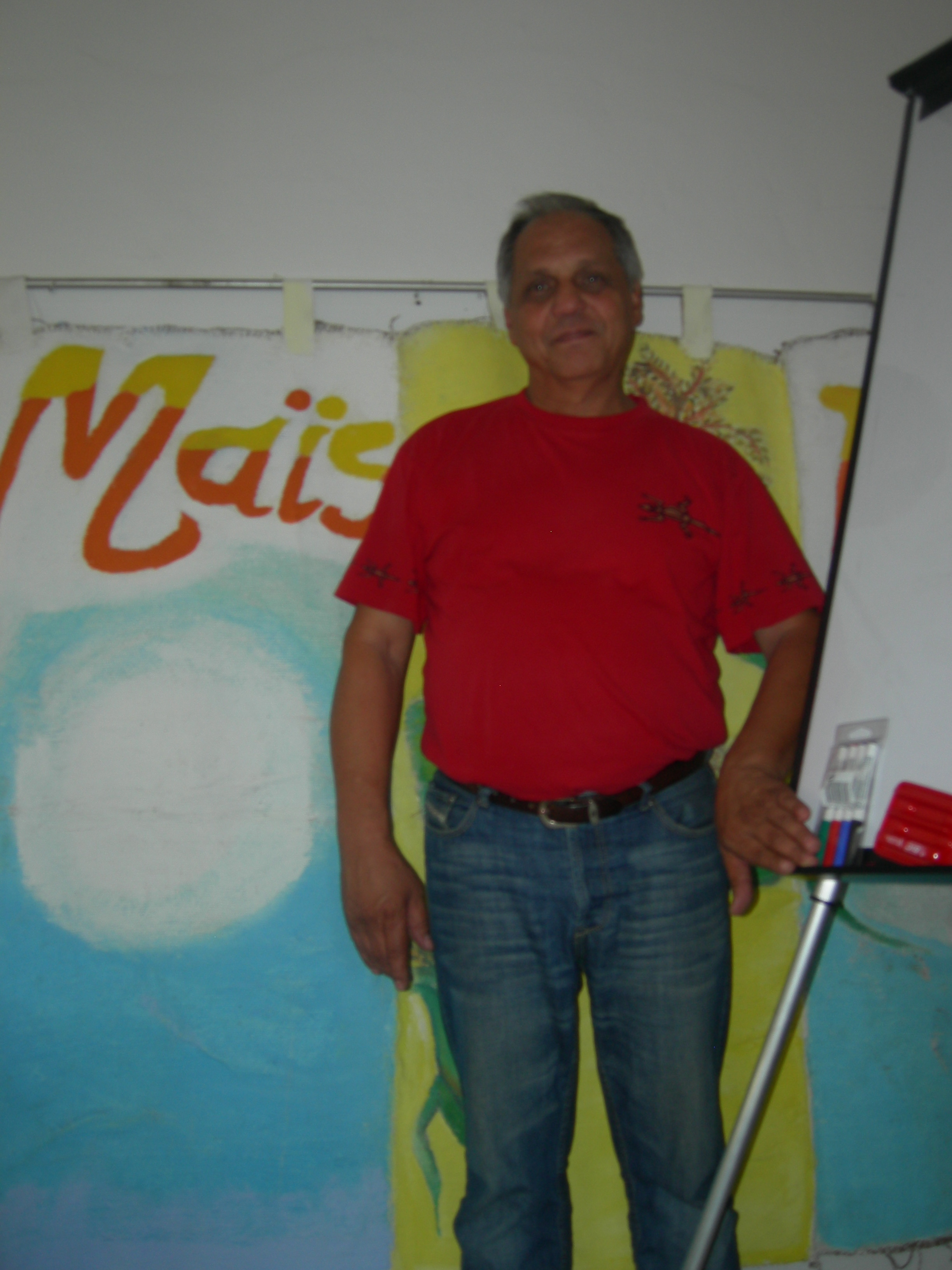 Un tout petit tableau pour un grand projet